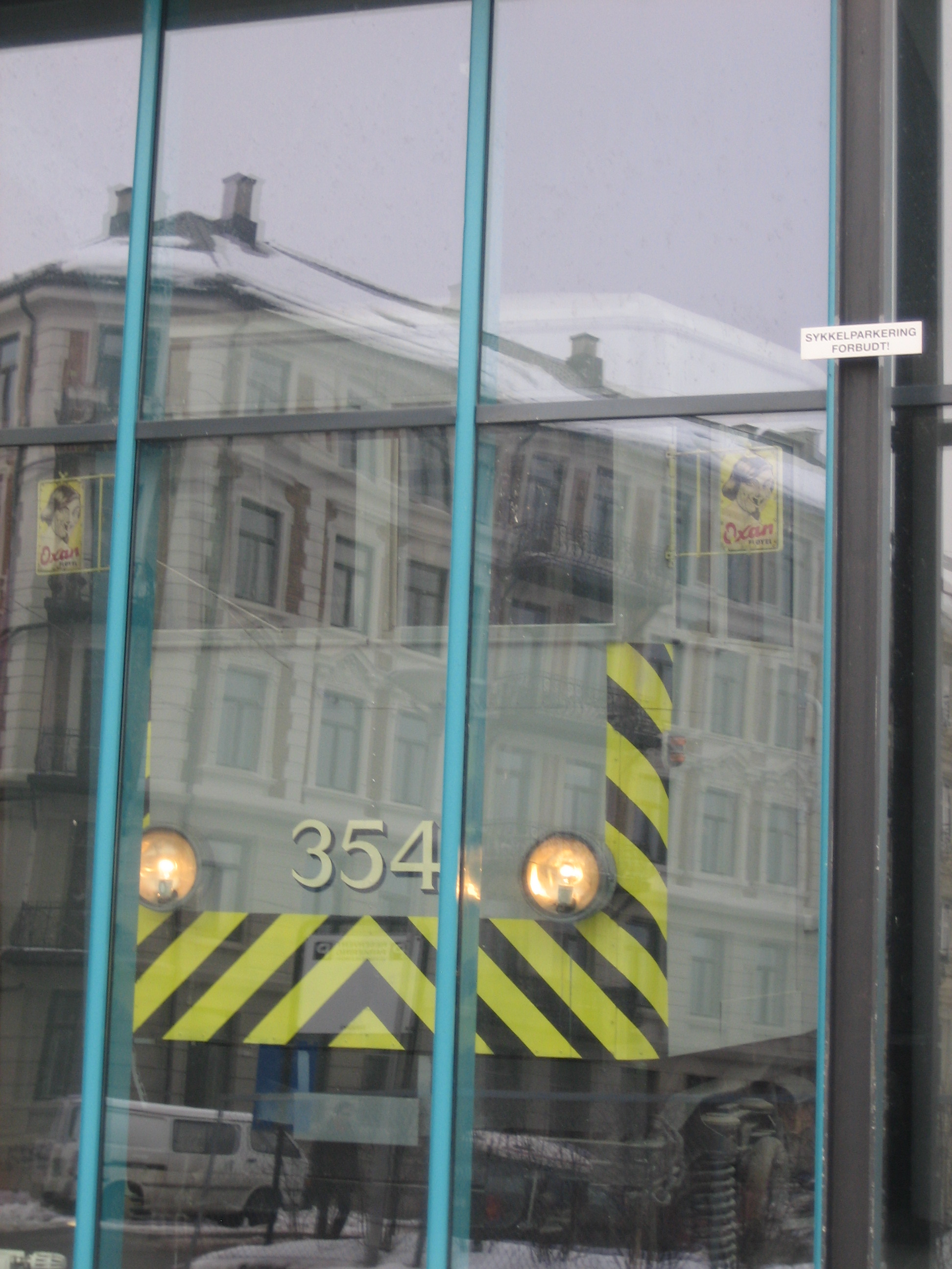 Replica av en korntrikk, plassert i studentsiloen på Kuba